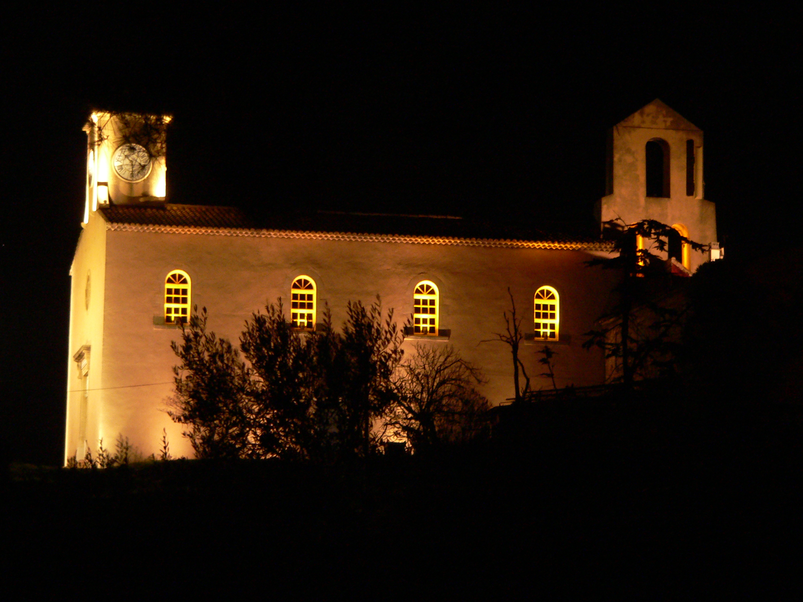 La vieille église de Septèmes transformée en salle du peuple